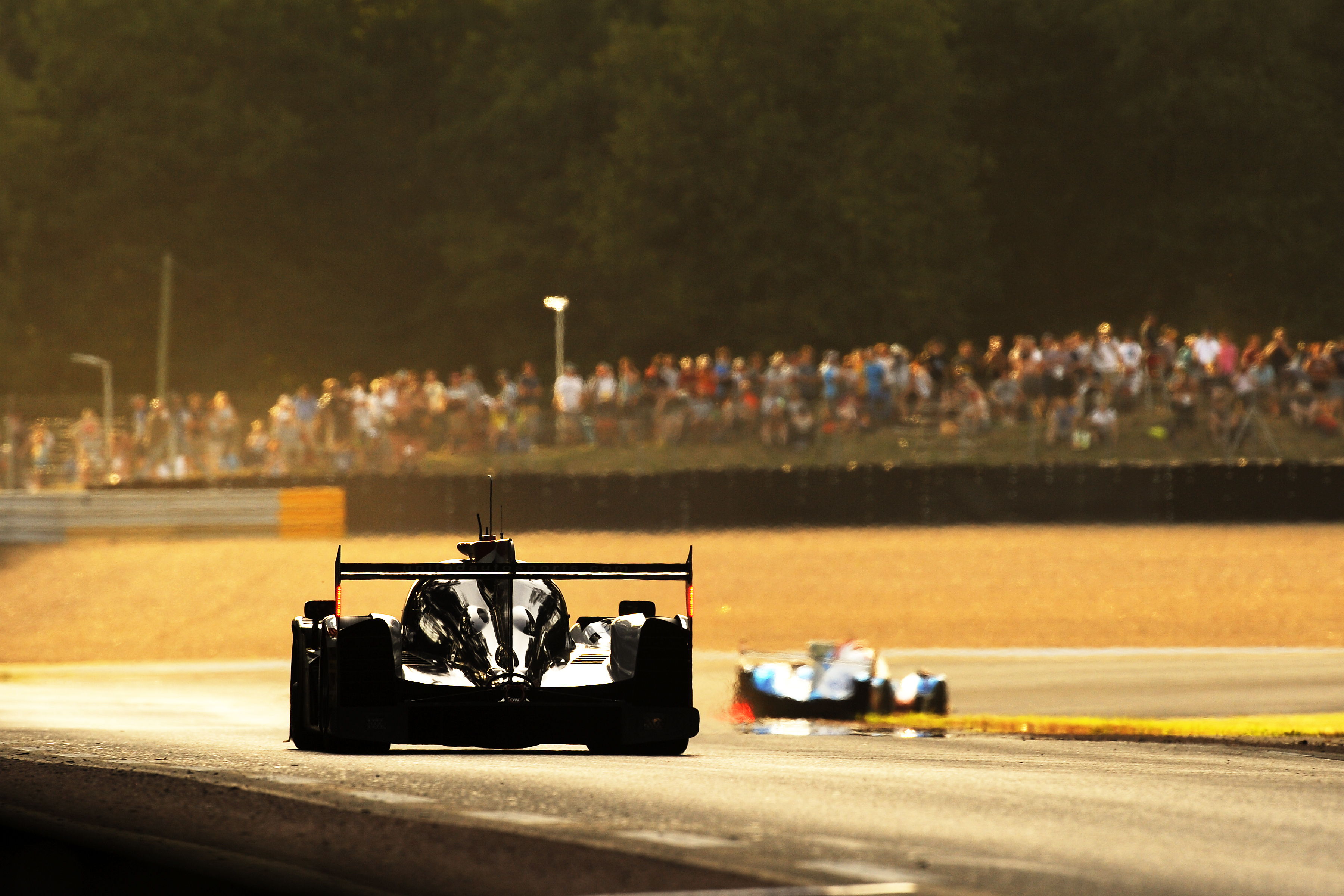 United Autosport lors des 24 Heures du Mans 2017.